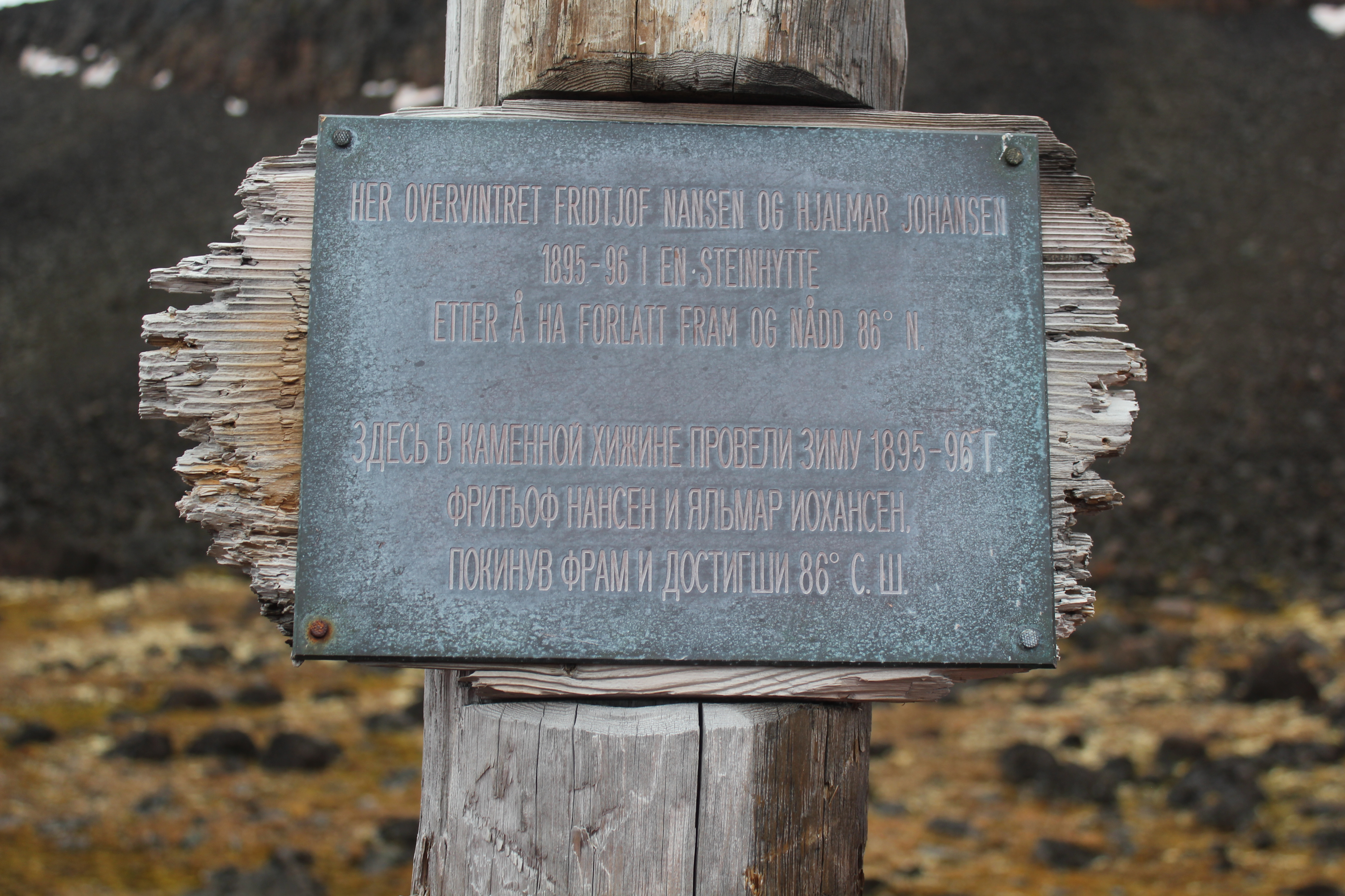 Комплексный заказник Земля Франца-Иосифа: Архангельск,Приморский район, Архангельская область This image is related to the protected area of Russia number 2930163